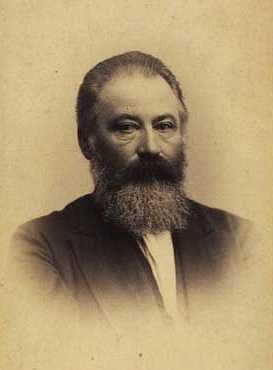 Ludvig Peter Schrøder (19.Jan.1836-08.Feb.1908), højskoleforstander. 1862-64 forstander for Rødding Højskole, 1865 forstander for Askov Højskole